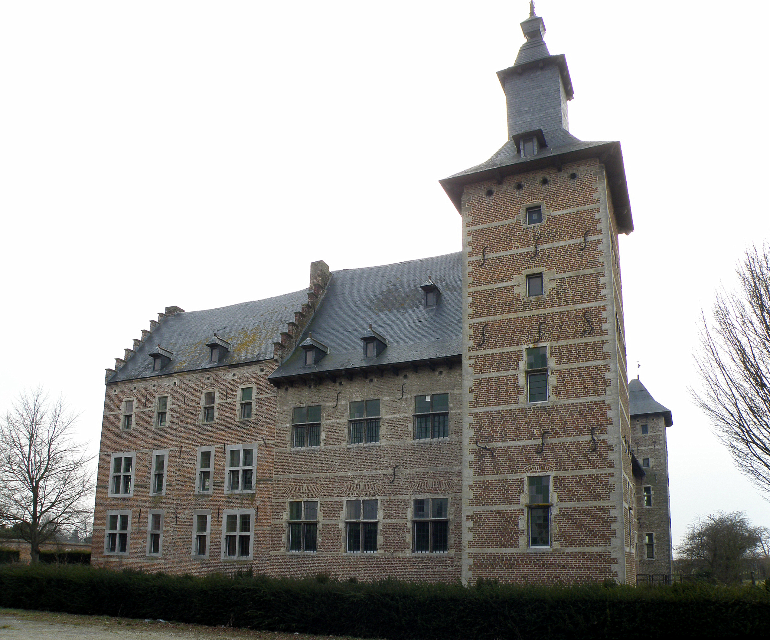 Borgloon, deelgem. Rijkel. Kasteel van Rijkel.